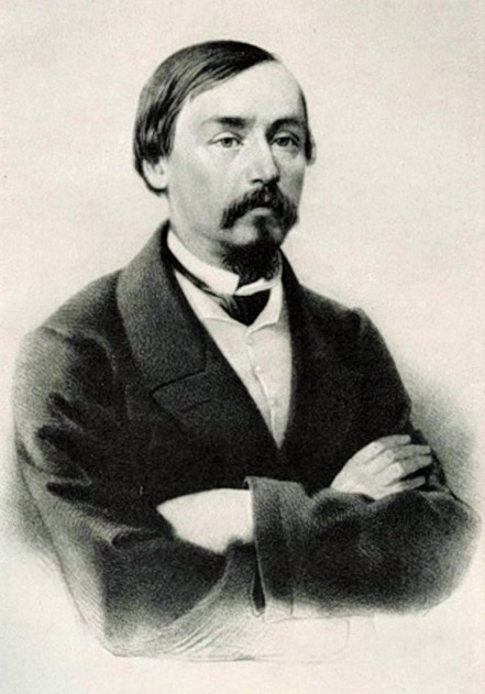 Nikolaj Alekseevič Nekrasov